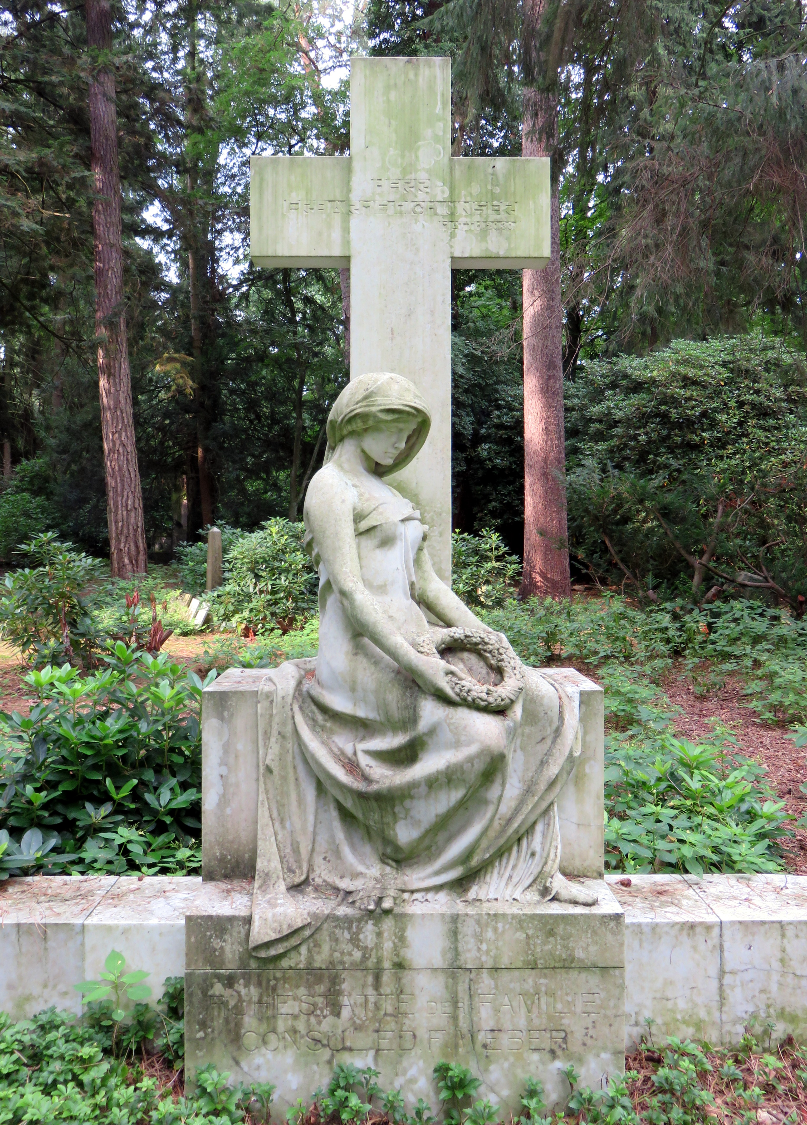 Familiengrab des deutschen Unternehmers, Kunstsammlers und Konsuls Eduard Friedrich Weber, Friedhof Ohlsdorf, Planquadrat AA 11 /AA12 (südwestlich Nordteich). Das Grabmal wurde 1907 vom deutschen Bildhauer Hans Dammann geschaffen.